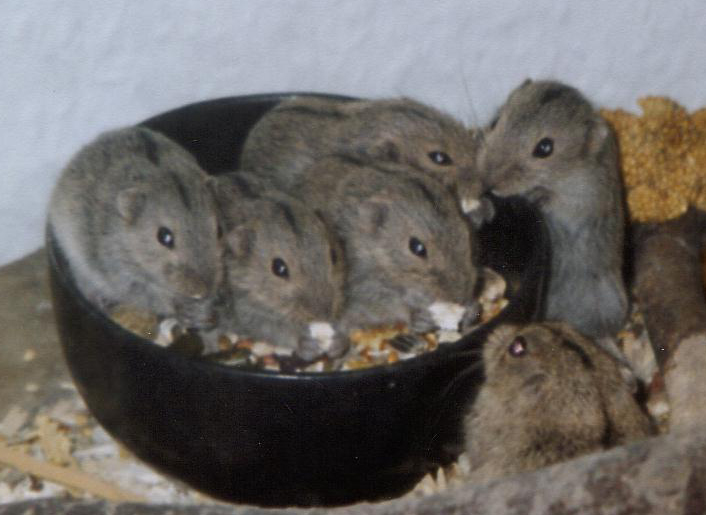 junge Steppenlemminge